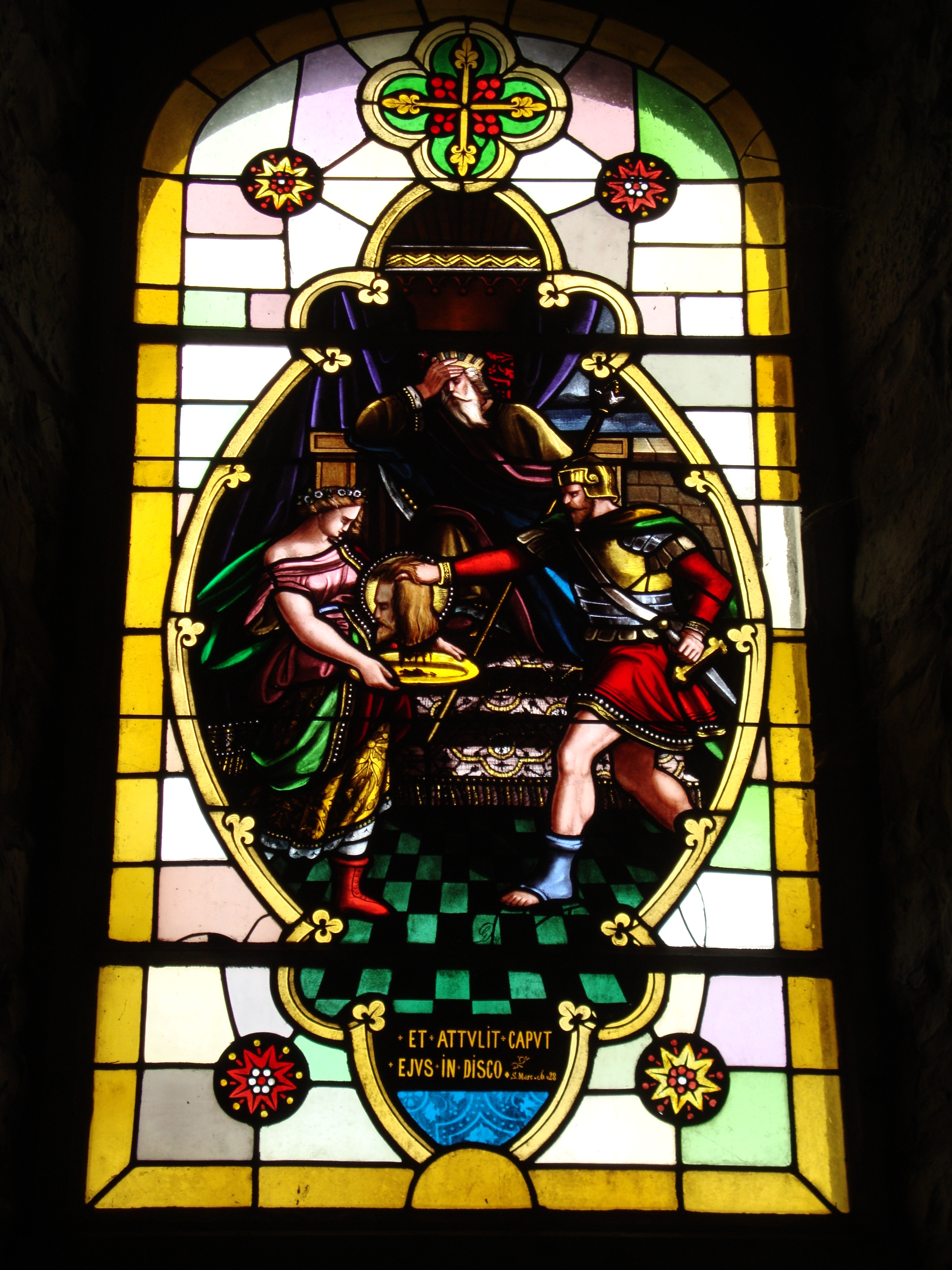 Irissarry_(Pyr-Atl,_Fr)vitrail Église Saint-Jean Baptiste; décapitation du saint.